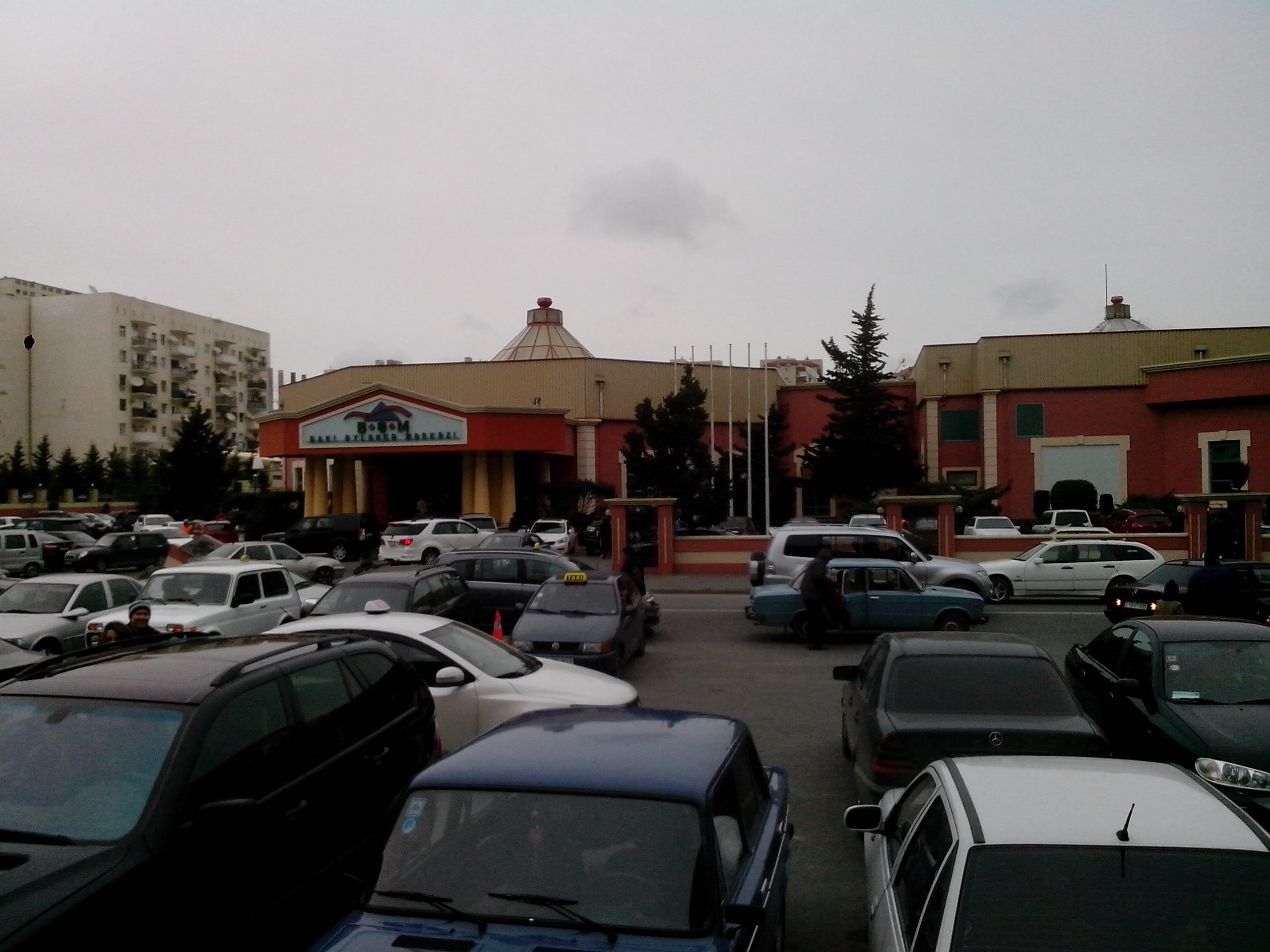 Bakı Əyləncə Mərkəzi